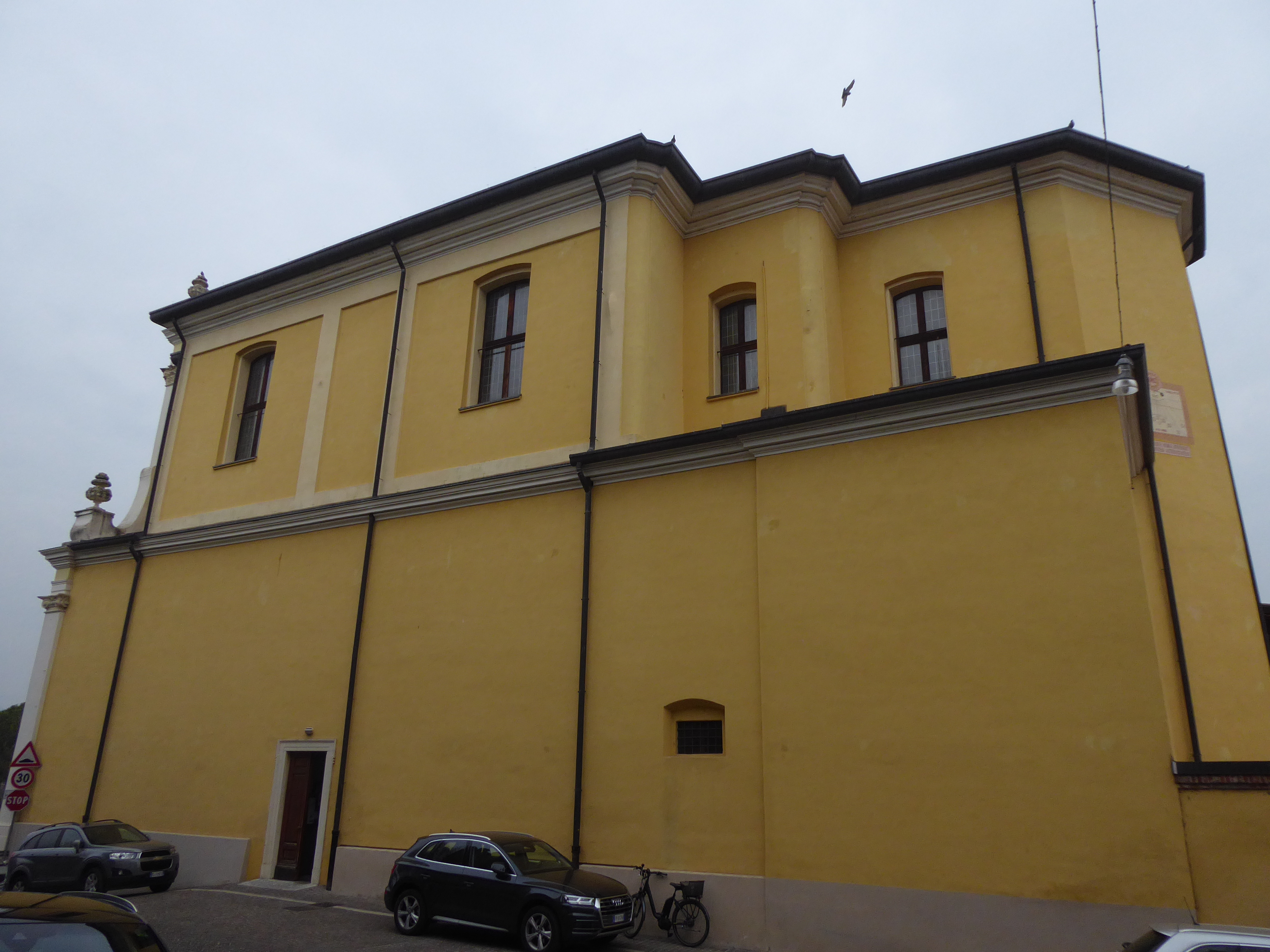 Moniga del Garda (Brescia, Lombardia) - Chiesa di San Martino